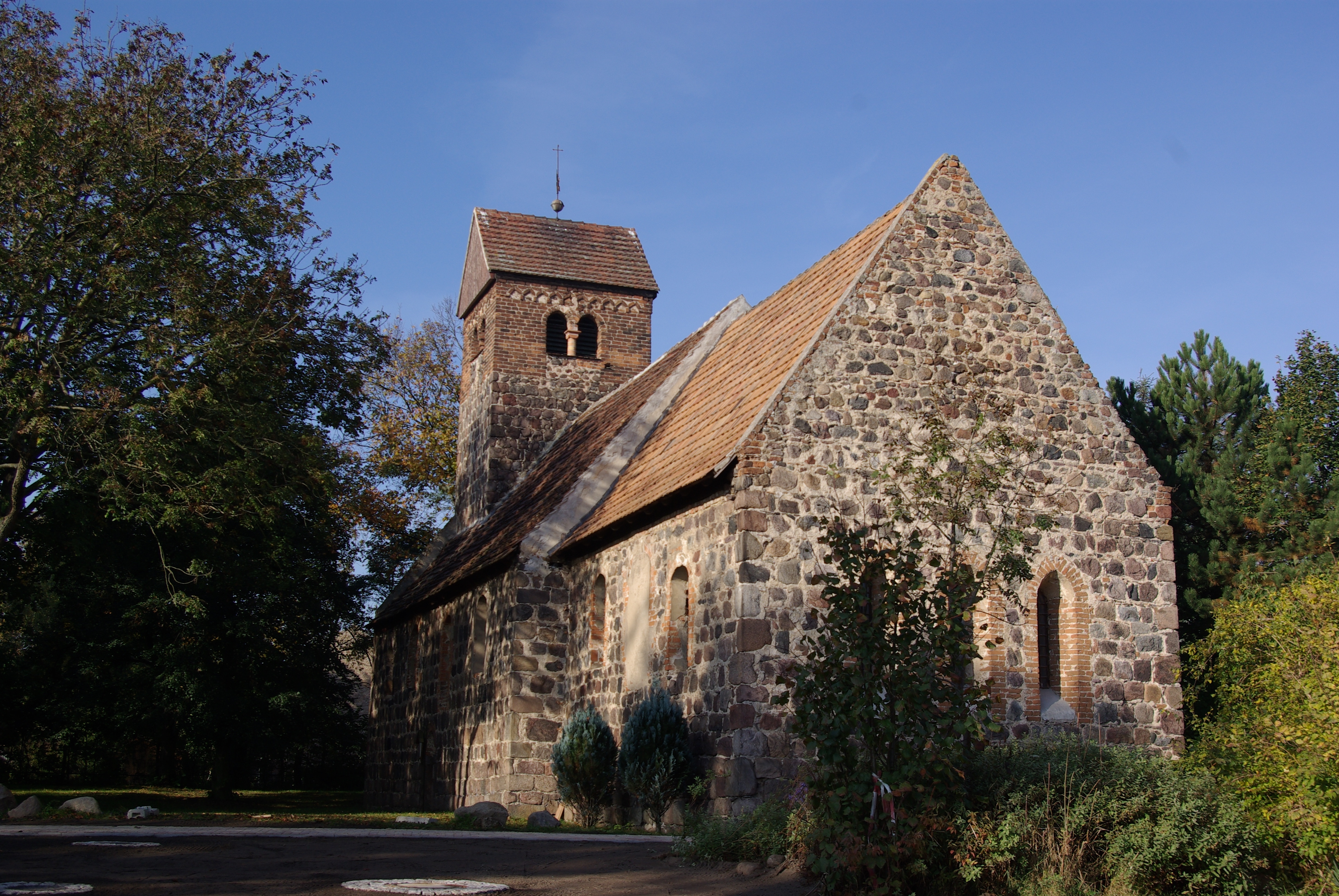 Rosenau in Brandenburg. Die Kirche im Ortsteil Viesen in Rosenau steht unter Denkmalschutz.